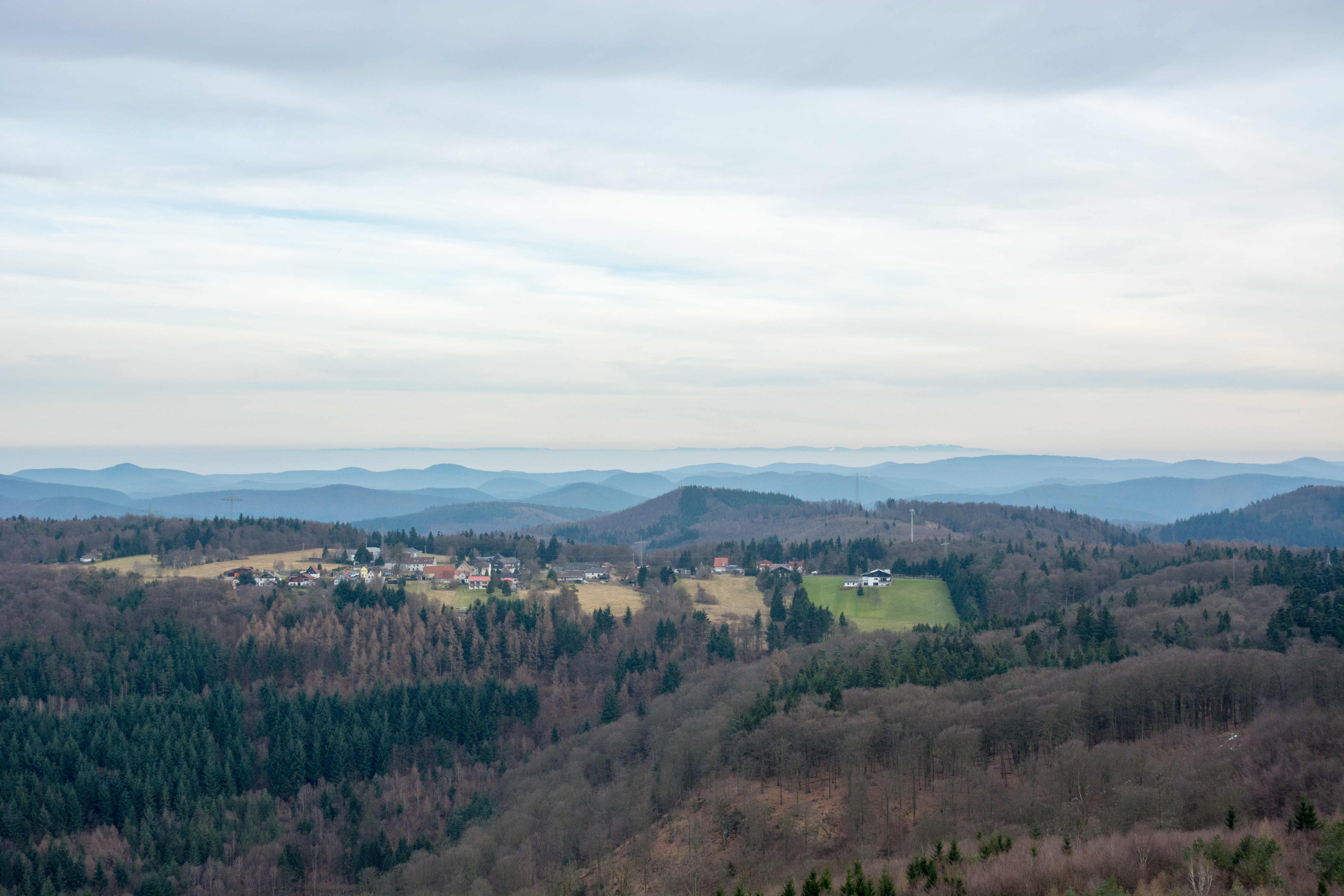 Blick auf den Hermersbergerhof vom Luitpoldturm aus, im Hintergrund das Rheintal im Nebel sowie die Hornisgrinde im Schwarzwald